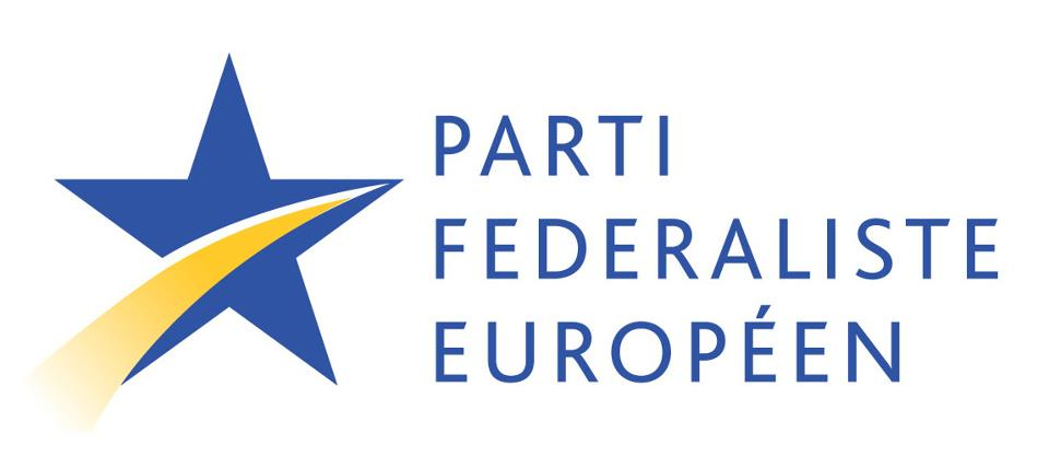 Le logo francophone du Parti Fédéraliste Européen